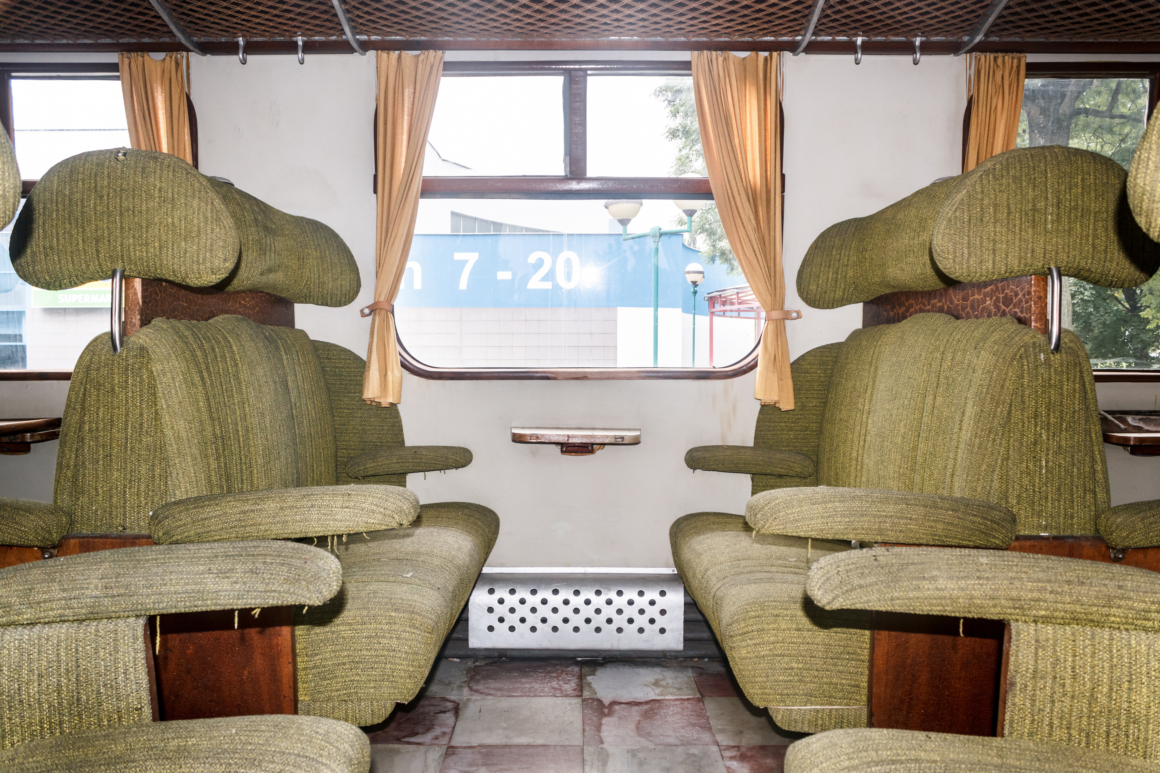 Snímek zachycuje sedadla v nekuřáckém oddílu vozu M 290.002 v podobě, jakou interiér vozu dostal při rekonstrukci na přelomu šedesátých a sedmdesátých let, kdy bylo odstraněno původní barevné a materiálové řešení navržené architektem Vladimírem Grégrem. Místo purpurového umělého pergamenu dostaly zdi obyčejný bílý povrch a sedadla nové sedáky s potahem ve světle zelené barvě namísto původní béžové s hnědým žíháním. Tuto podobu si interiér udržel až do rekonstrukce v letech 2019–2020.